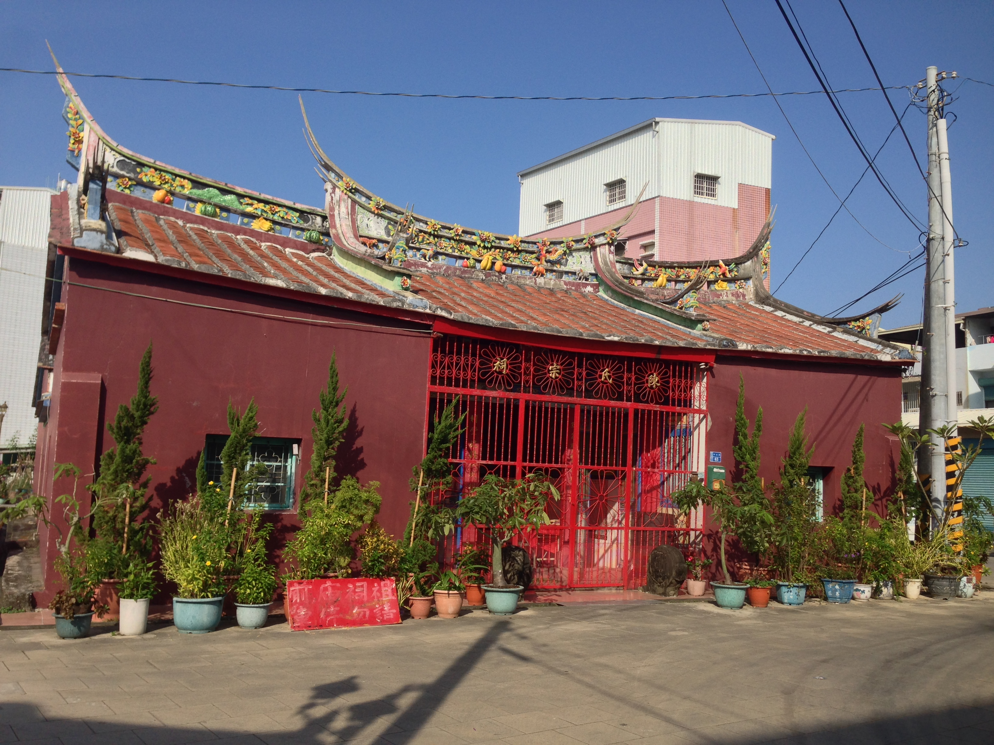 里港鄉陳氏宗祠